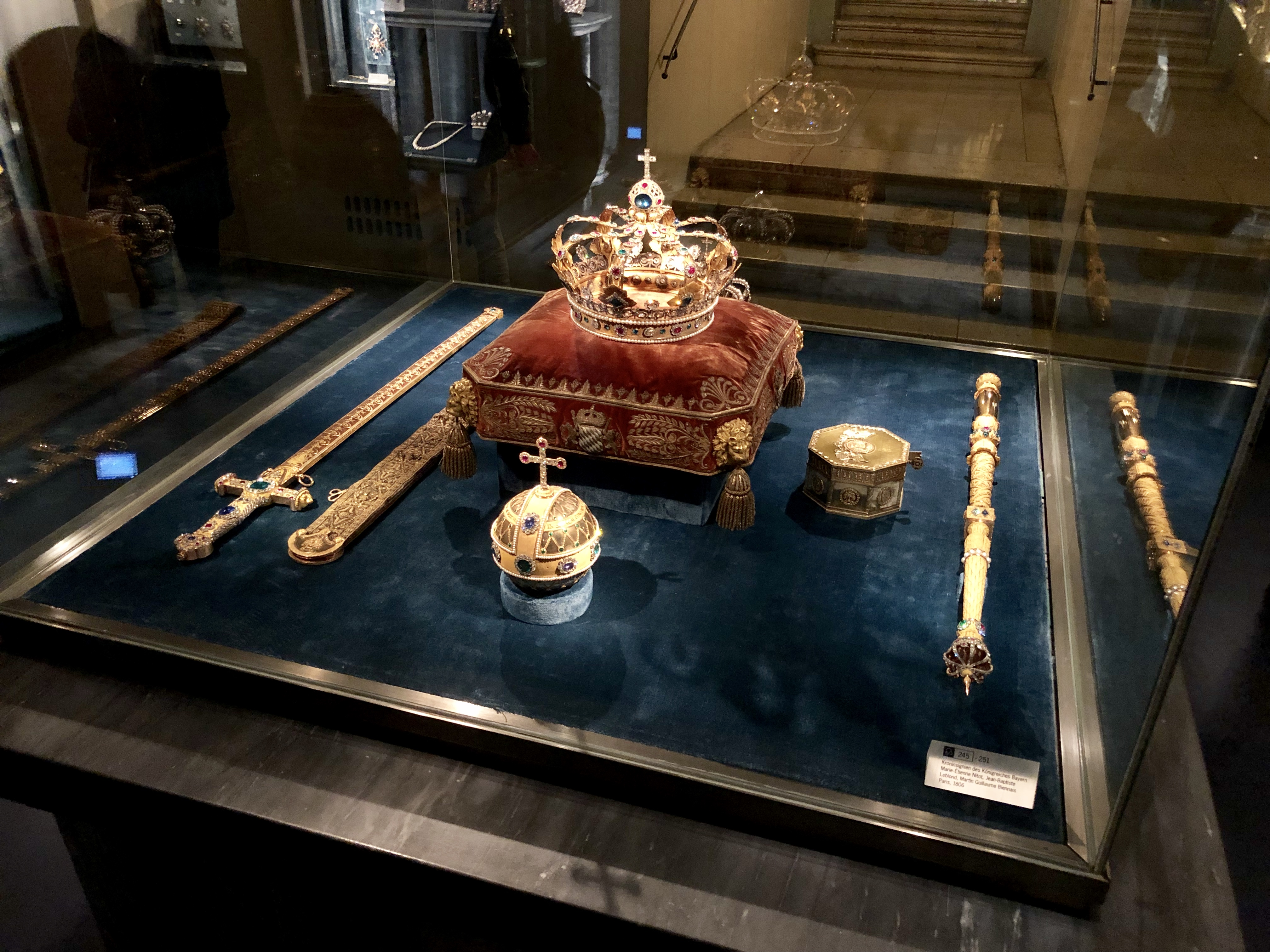 Kroninsignien des Königreiches Bayern.